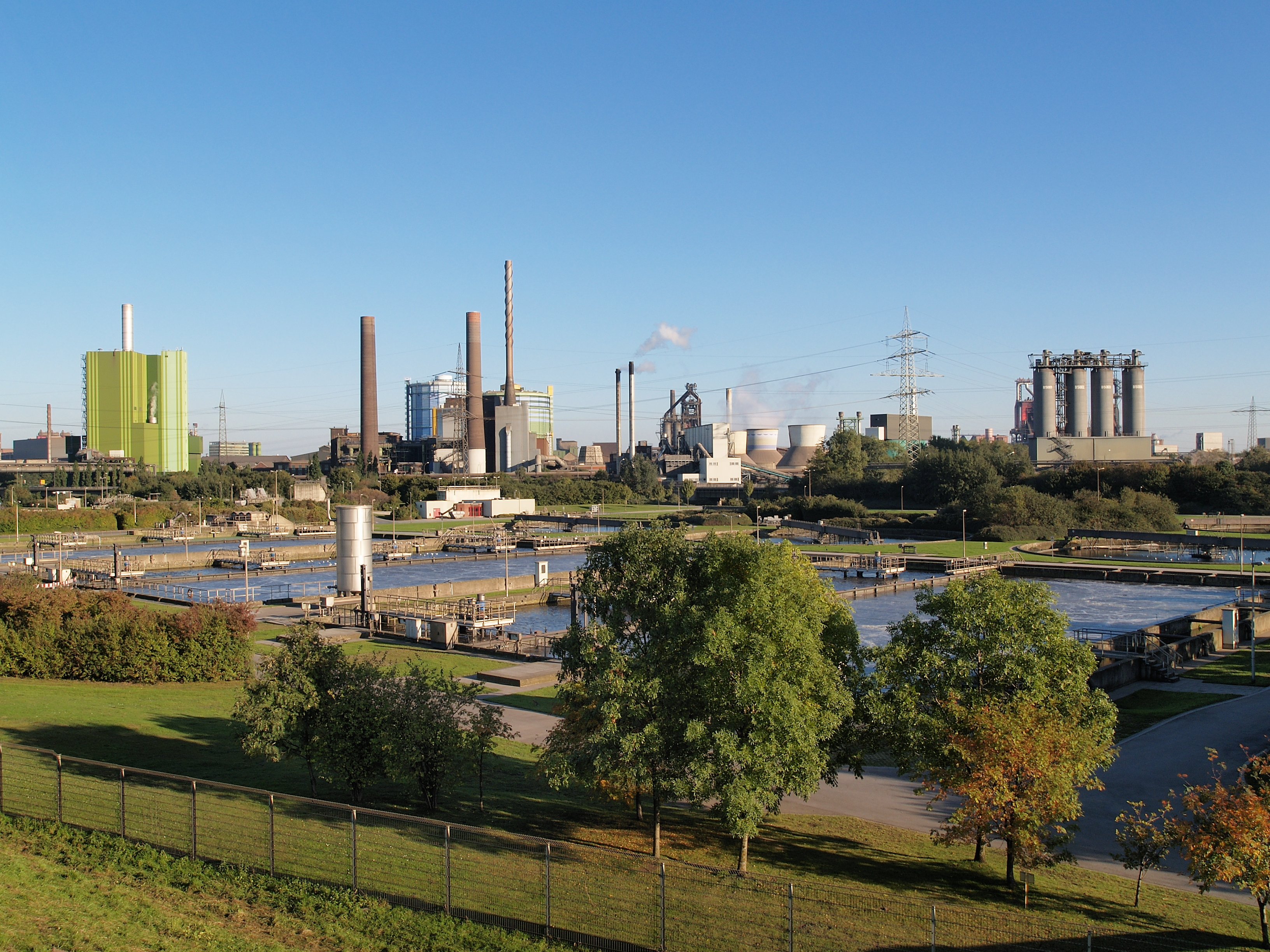 Das Klärwerk Alte Emscher vor der Industriekulisse von ThyssenKrupp in Duisburg, gesehen vom rechten Rheinuferweg.